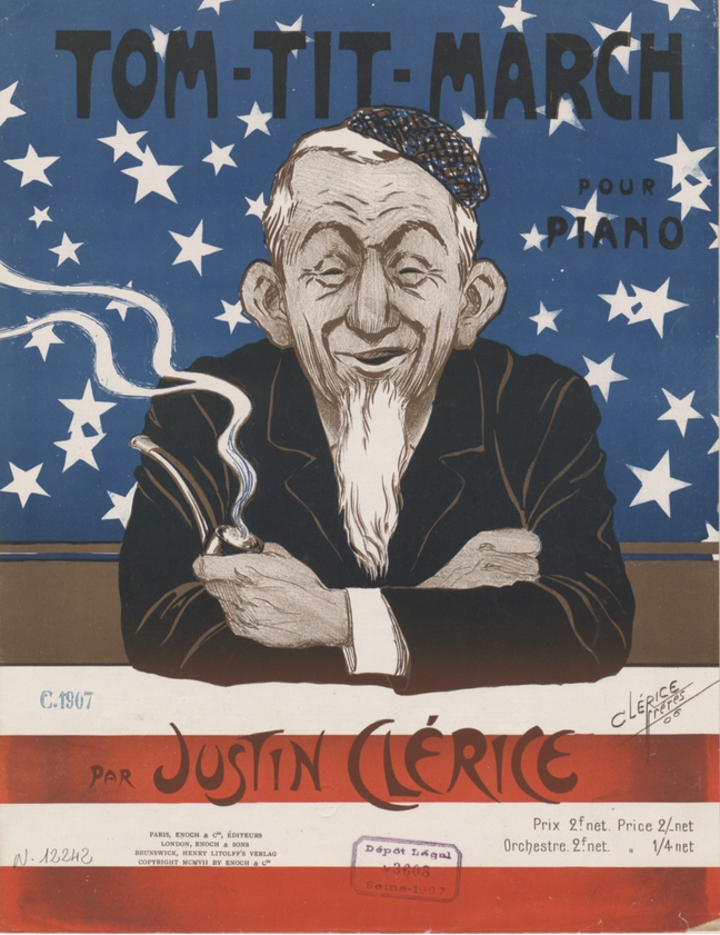 Tom-tit-march : pour piano par Justin Clérice, sheet music cover designed by Justin Clérice, published by Enoch & Cie (Paris).